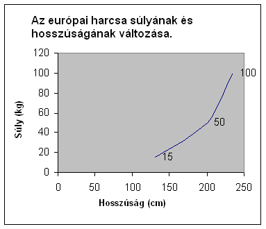 Kimutatás az európai harcsa növekedéséről és súlyváltozásáról